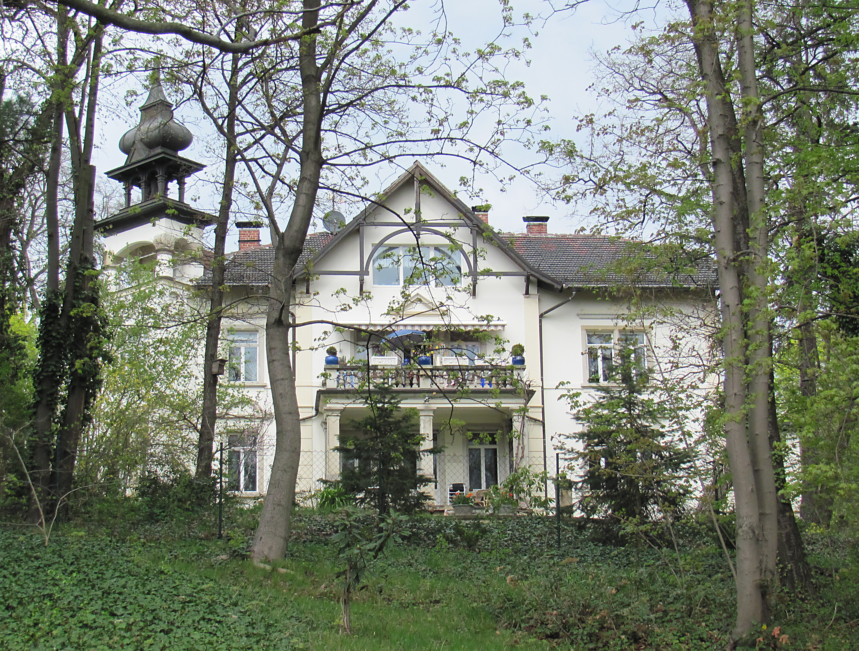 Radebeul, Villa Columbia